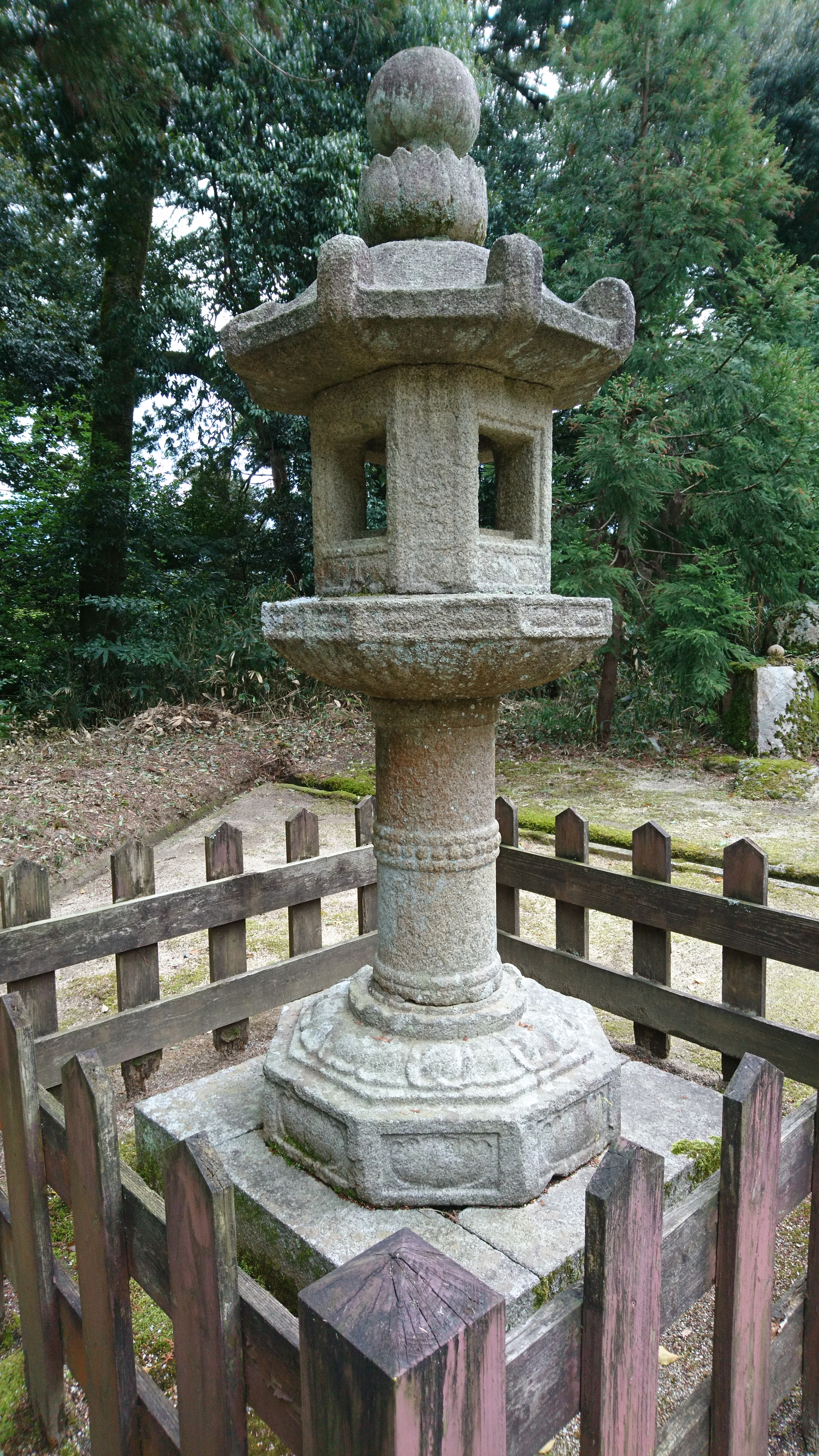 加悦天満宮 鎌倉時代後期の石灯篭（京都府指定文化財・国認定重要美術品）